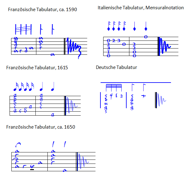 Französische, italienische und deutsche Tabulaturen mit verschiedenen Rhythmuszeichen